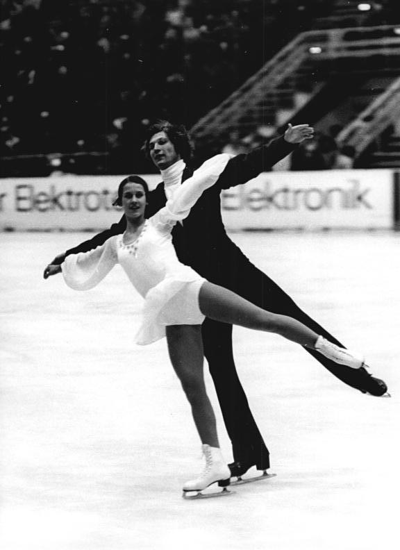 Manuela Groß, Uwe Kagelmann ADN-ZB Häßler 17.11.1973 Dresden: Groß - Kagelmann überzeugten.- Beim internationalen Pokalwettbewerb im Eiskunstlaufen in Dresden gewannen im Paarlauf die Vorjahressieger Manuela Groß - Uwe Kagelmann. Damit ging der "Pokal der blauen Schwerter" nach dreimaligem Gewinn endgültig in ihren Besitz über. Unser Foto zeigt das Paar in einem früheren Wettkampf.